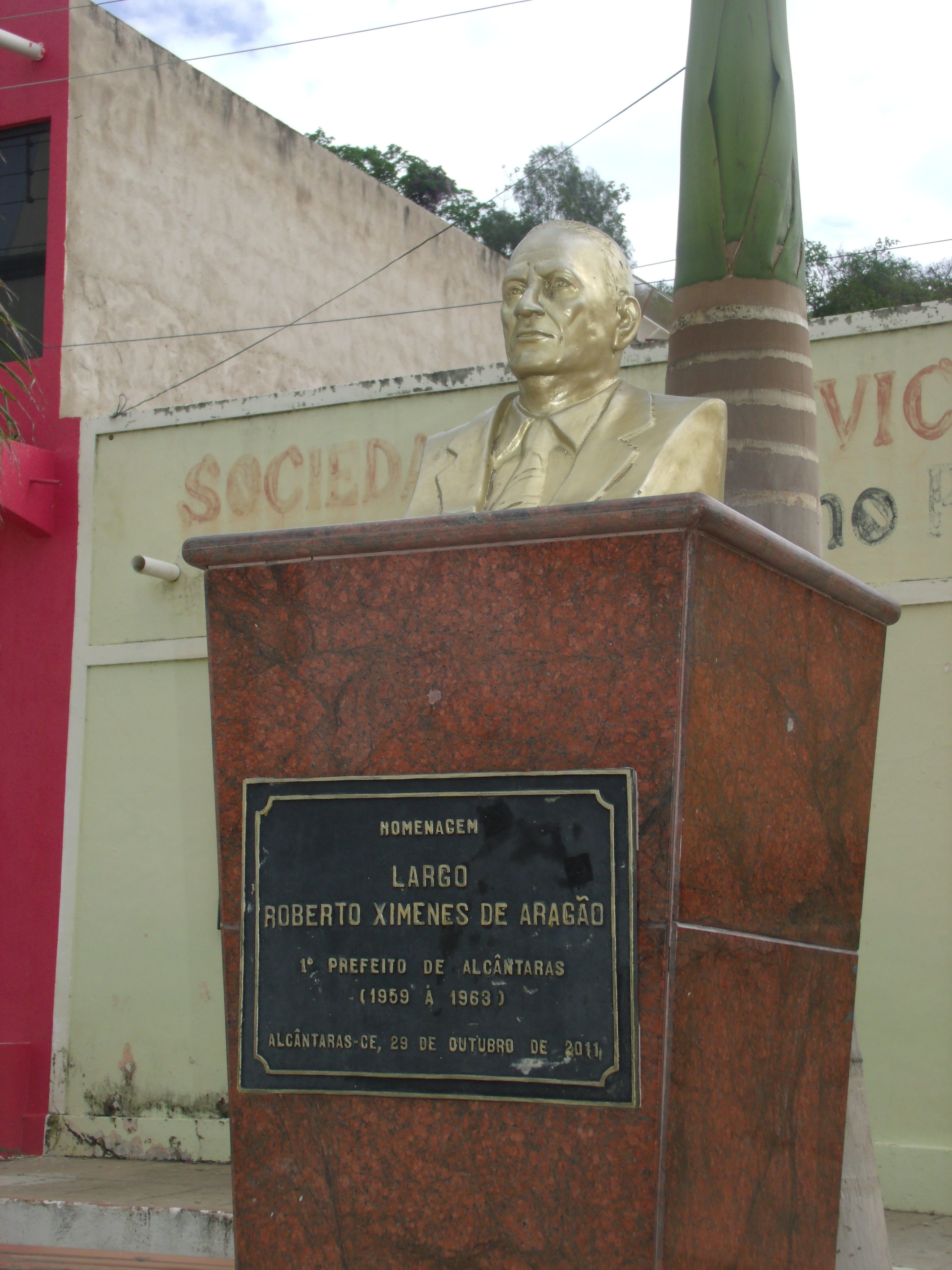 Busto monumento a Roberto Ximenes Aragão, primeiro prefeito de Alcântaras, Ceará.